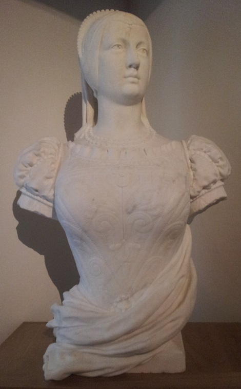 Buste en marbre de Pernette du Guillet par Jean-Louis Pivot réalisé en 1898. Musées Gadagne.